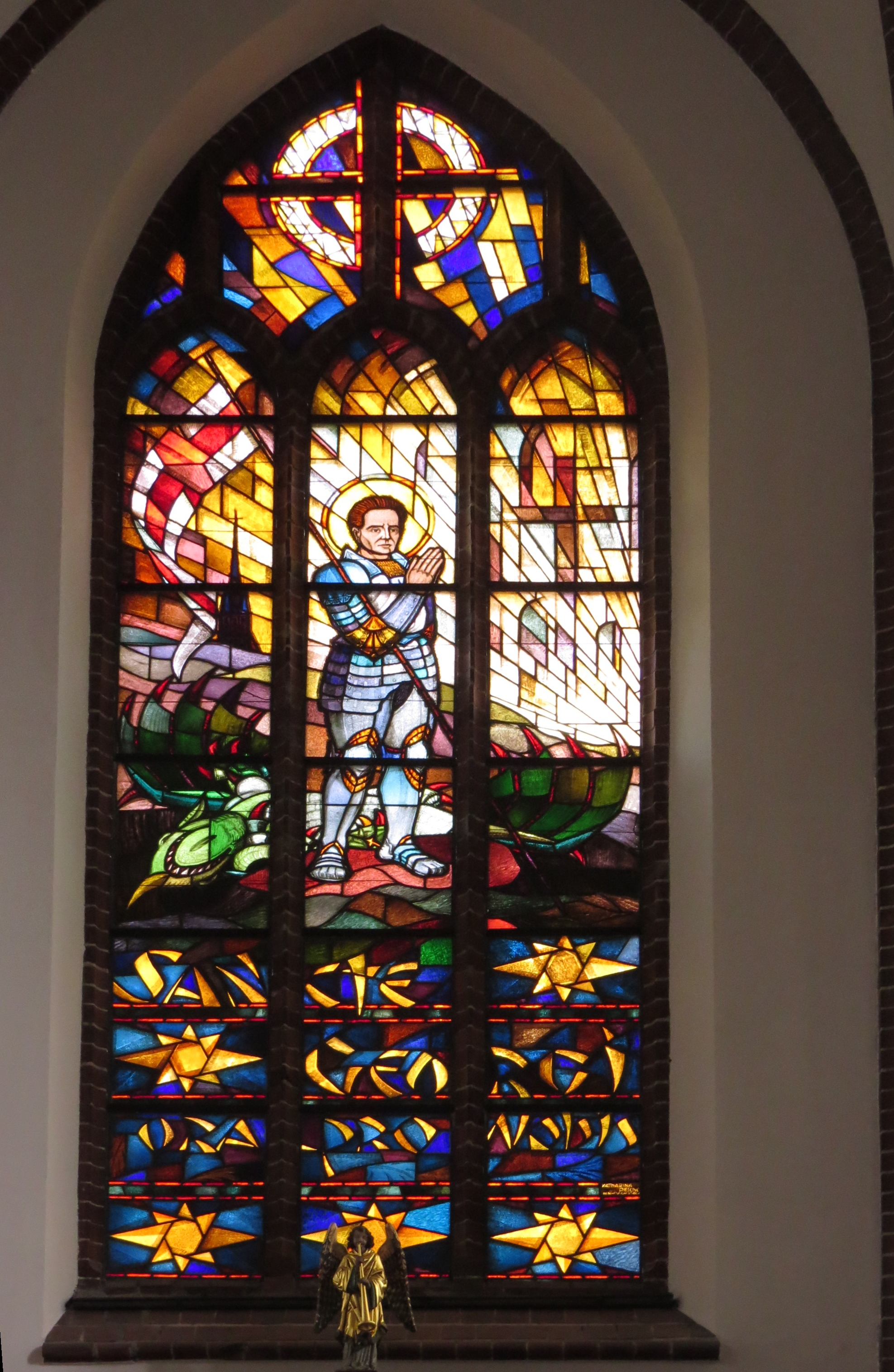 Kirche St. Georg, Berlin-Pankow, Altarfenster mit dem Kirchenpatron: St. Georg, bitte für uns